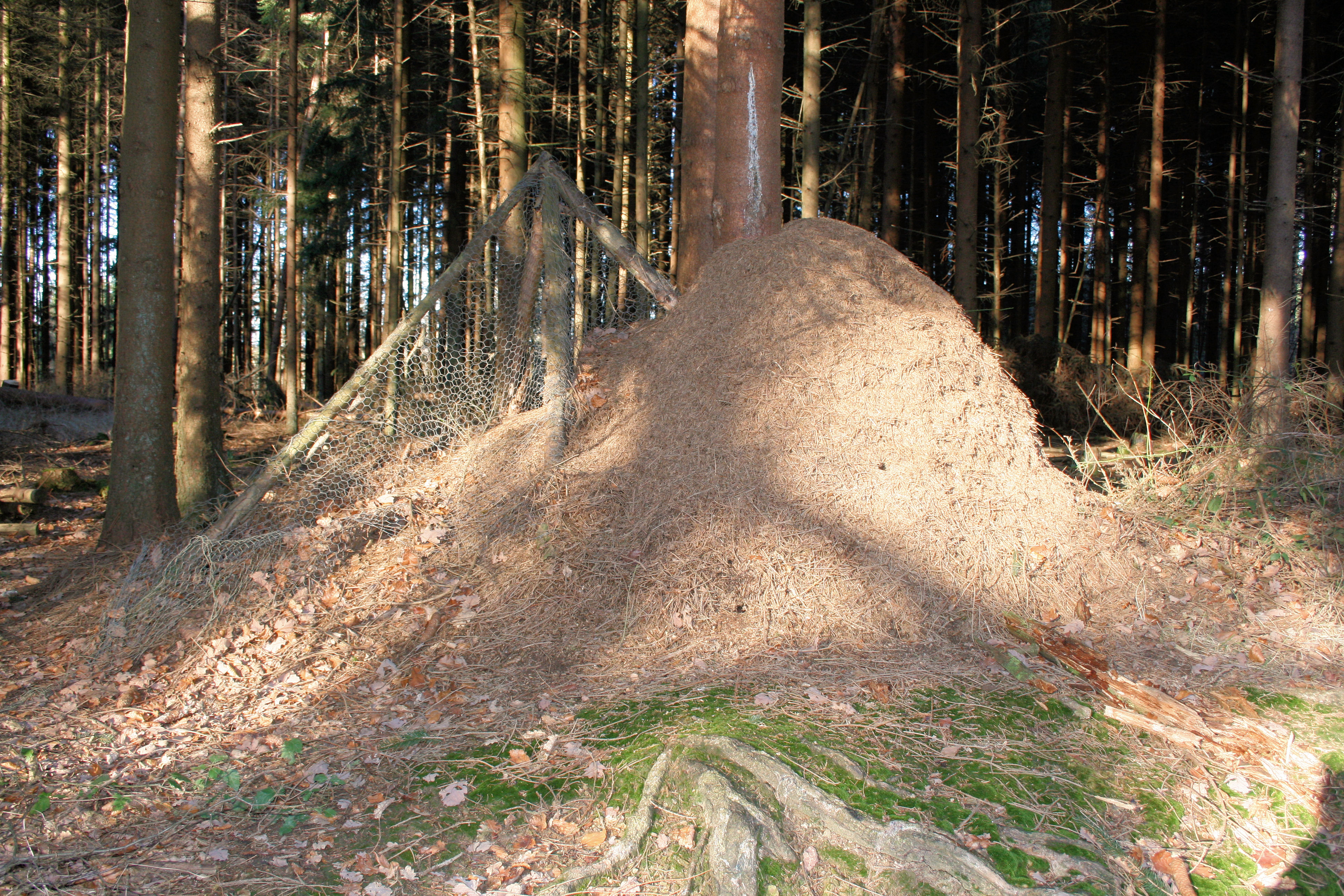 Waldameisenbau